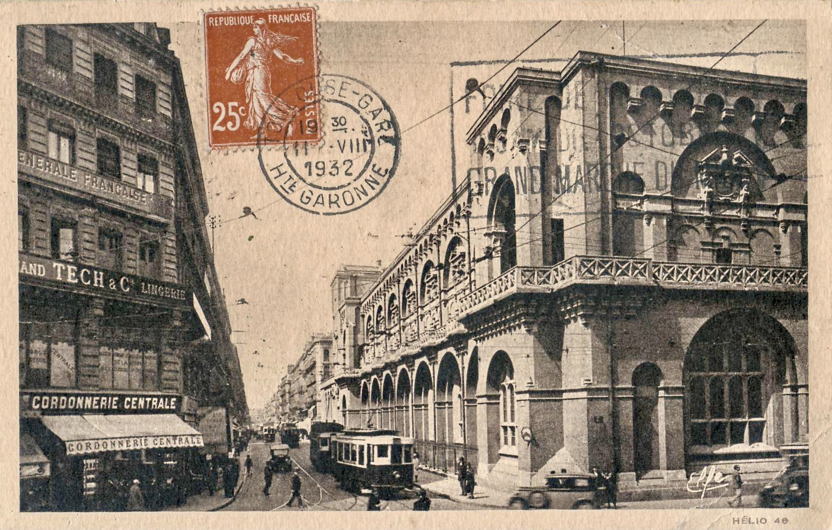 Carte postale semi-moderne éditée par Hélio "Elfe" Labouche Frères à Toulouse, n°79 : TOULOUSE - Façade du Musée, rue d'Alsace-Lorraine